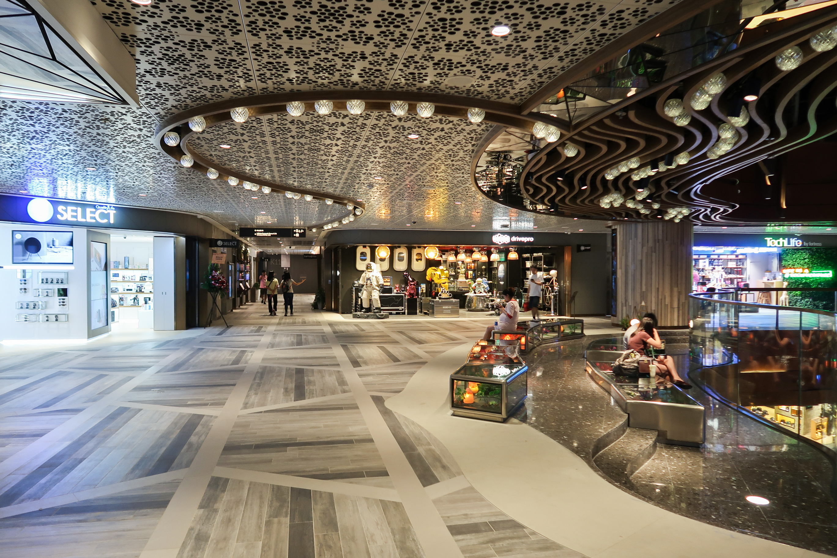 K11 MUSEA Level 1